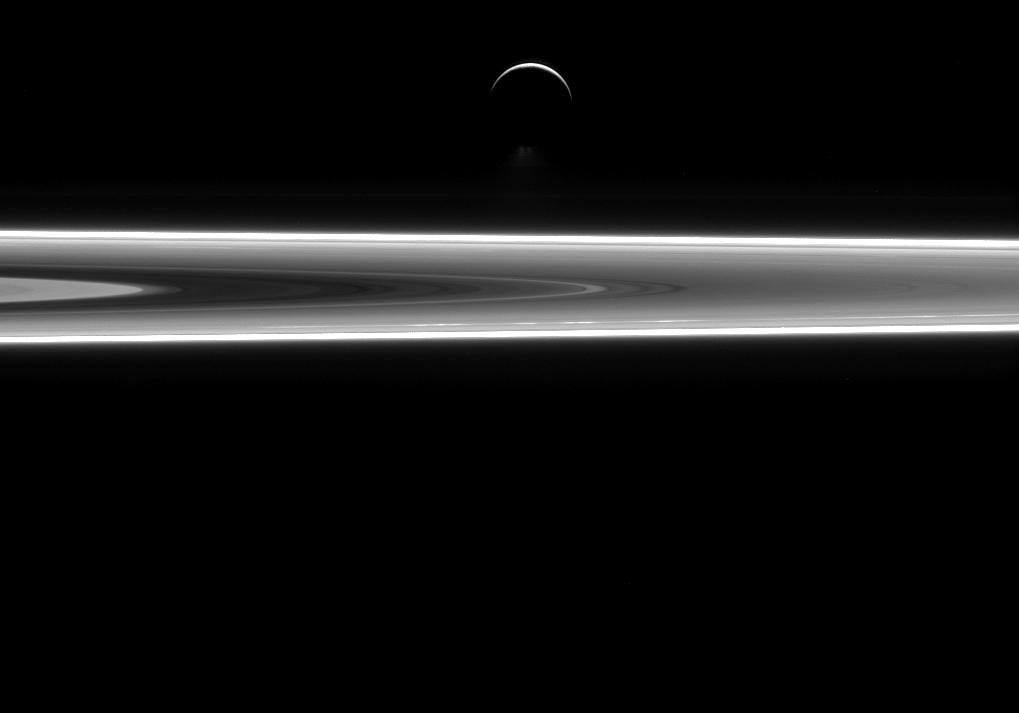 Saturn's icy moon Enceladus poses above the gas giant's icy rings in this Cassini spacecraft image. The dramatic scene was captured on July 29, while Cassini cruised just below the ring plane, its cameras looking back in a nearly sunward direction about 1 million kilometers from the moon's bright crescent. Enceladus's south polar geysers are visible venting beyond a dark southern limb.